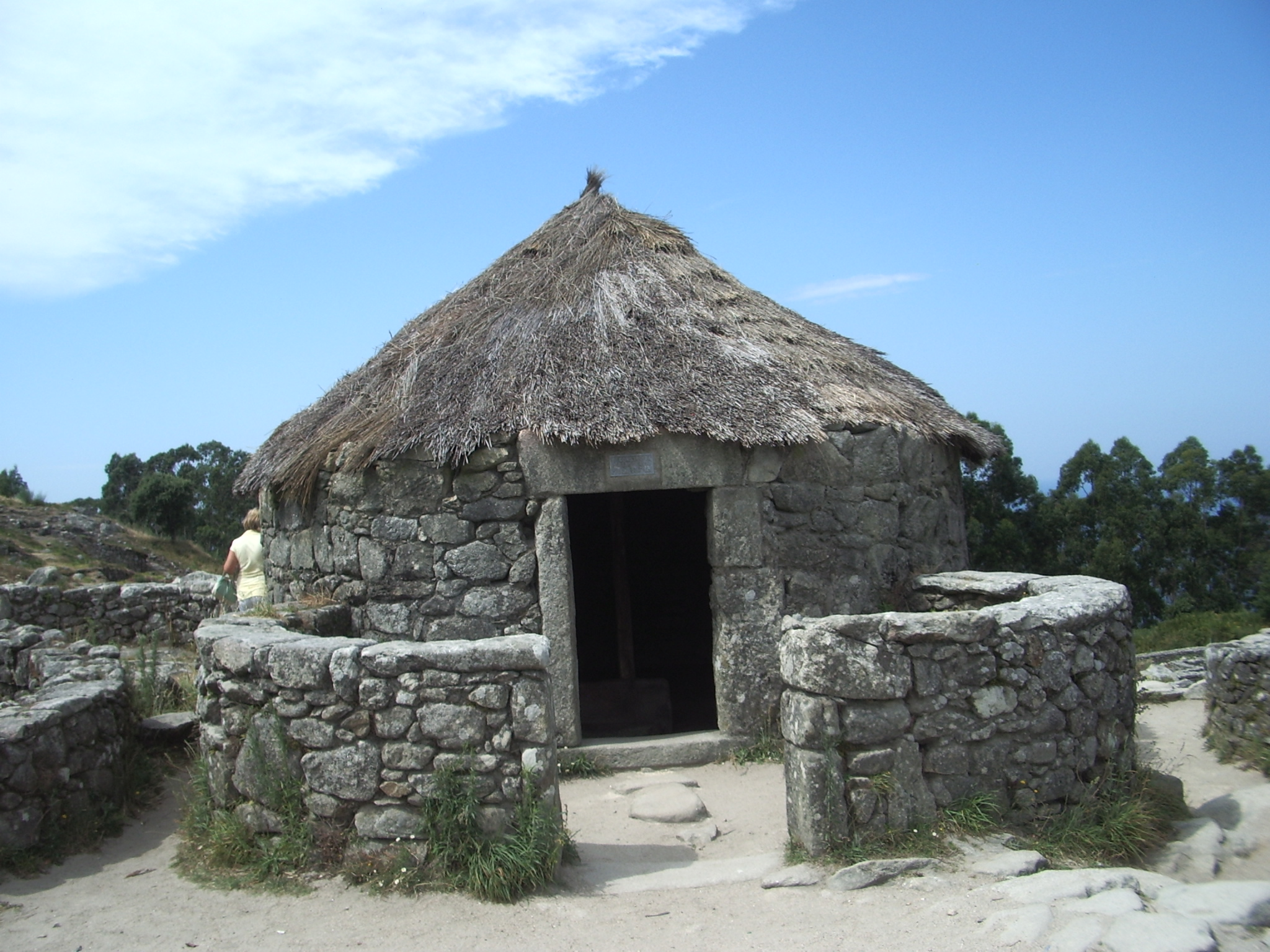 Casa en el Castro celta de Santa Trega (Galicia, España)